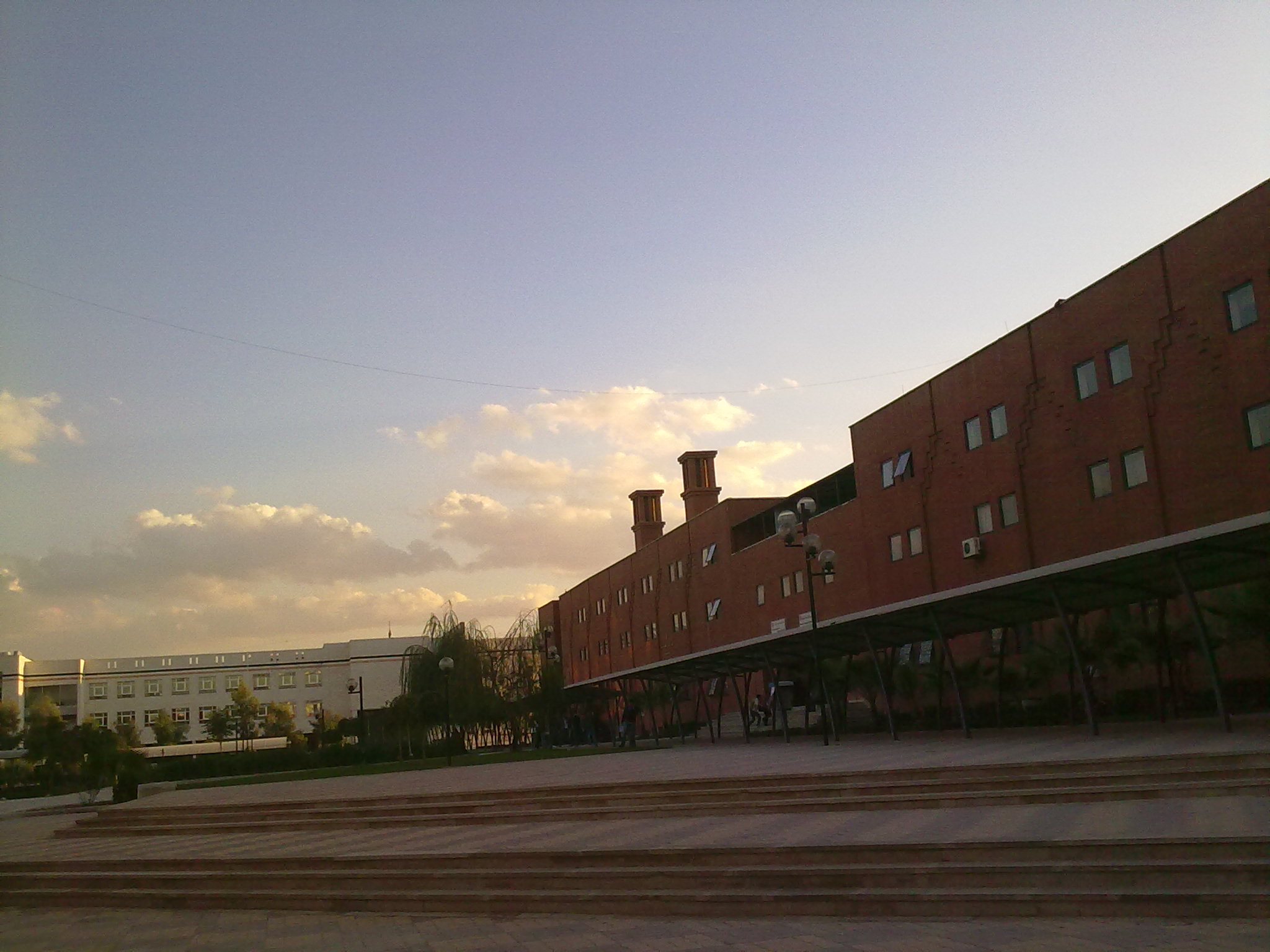 بناء هندسة الحواسيب والأتمتة في جامعة دمشق